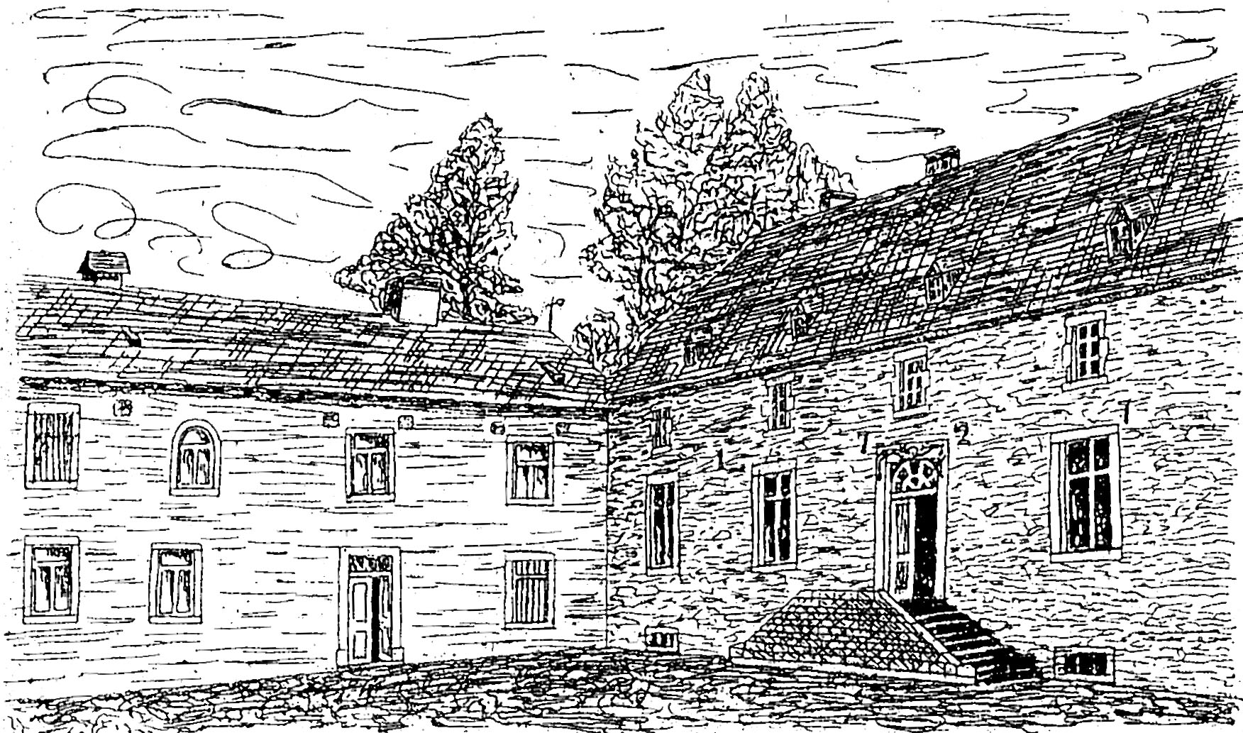 Grandvoir croquis facade 1